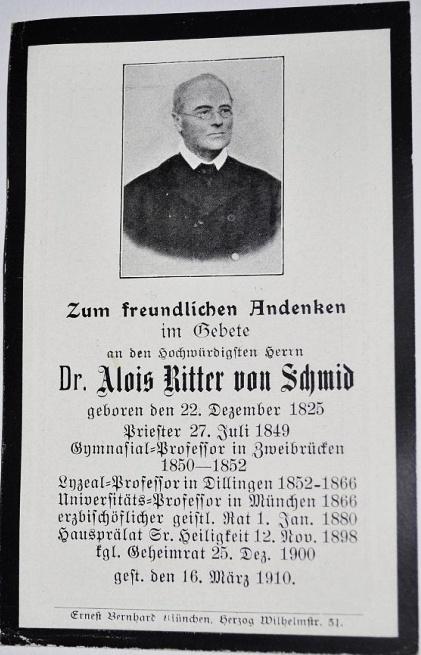 Sterbebildchen Theologieprofessor Alois von Schmid, 1910